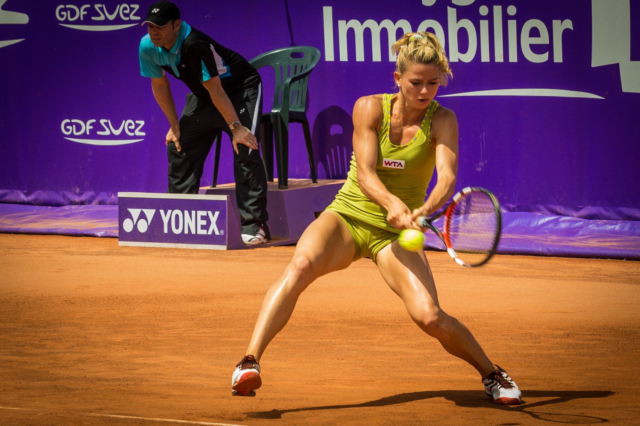 Camila Giorgi, née le 31 décembre 1991 à Macerata, est une joueuse de tennis italienne.